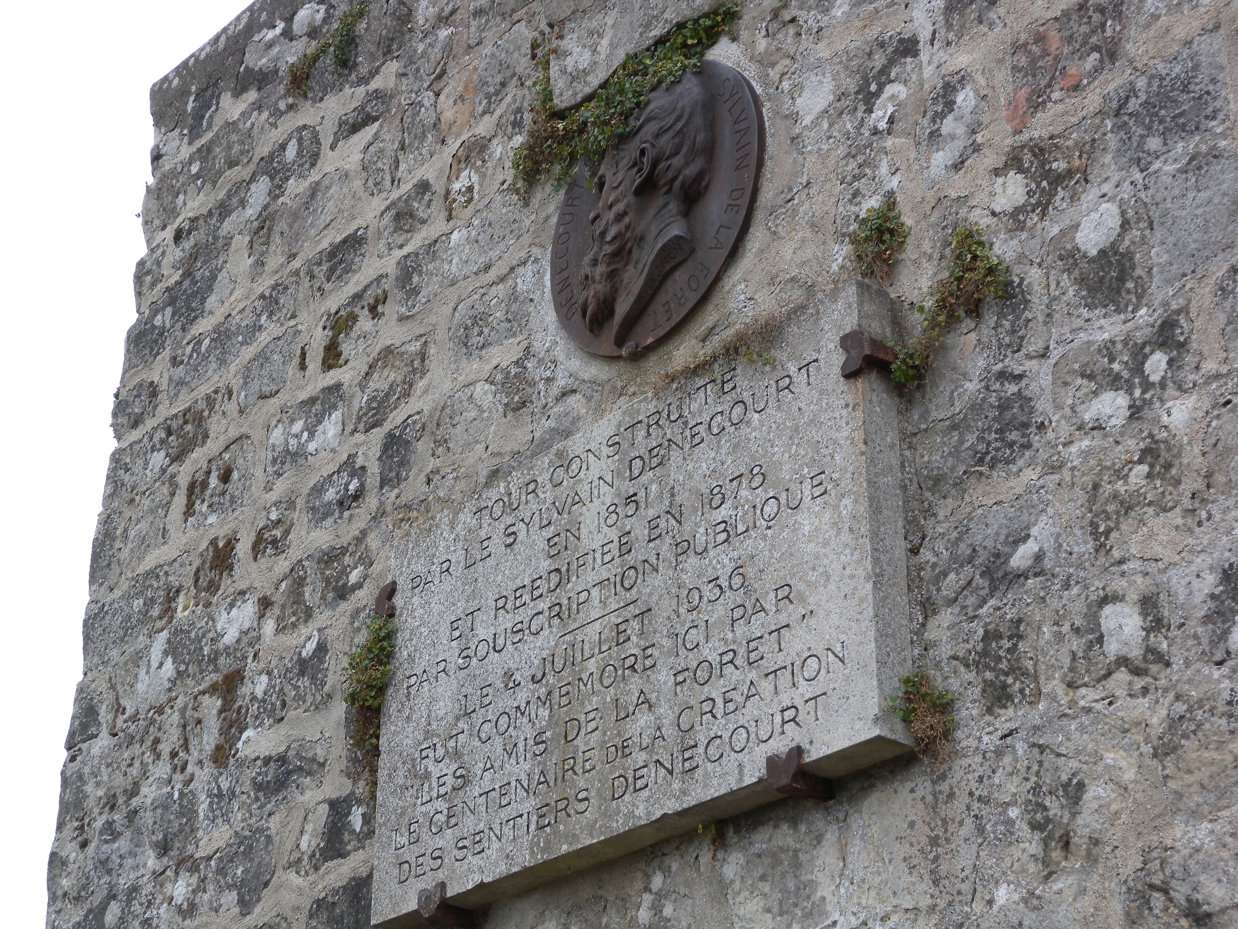 Tour Denecourt : Sur le sentier Denecourt, Forêt de Fontainebleau